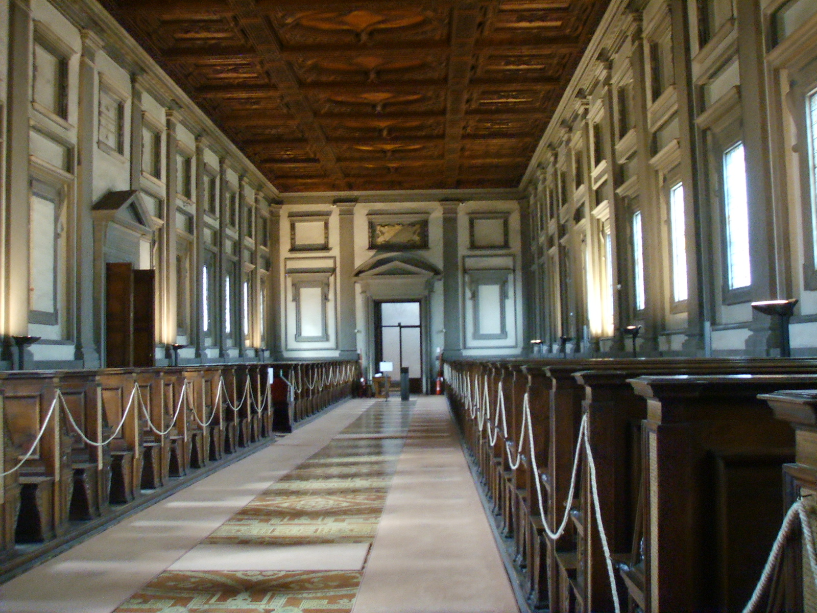 Biblioteca medicea laurenziana interno